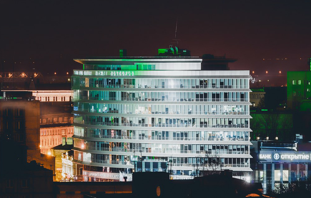 Всемирный торговый центр Нижний Новгород